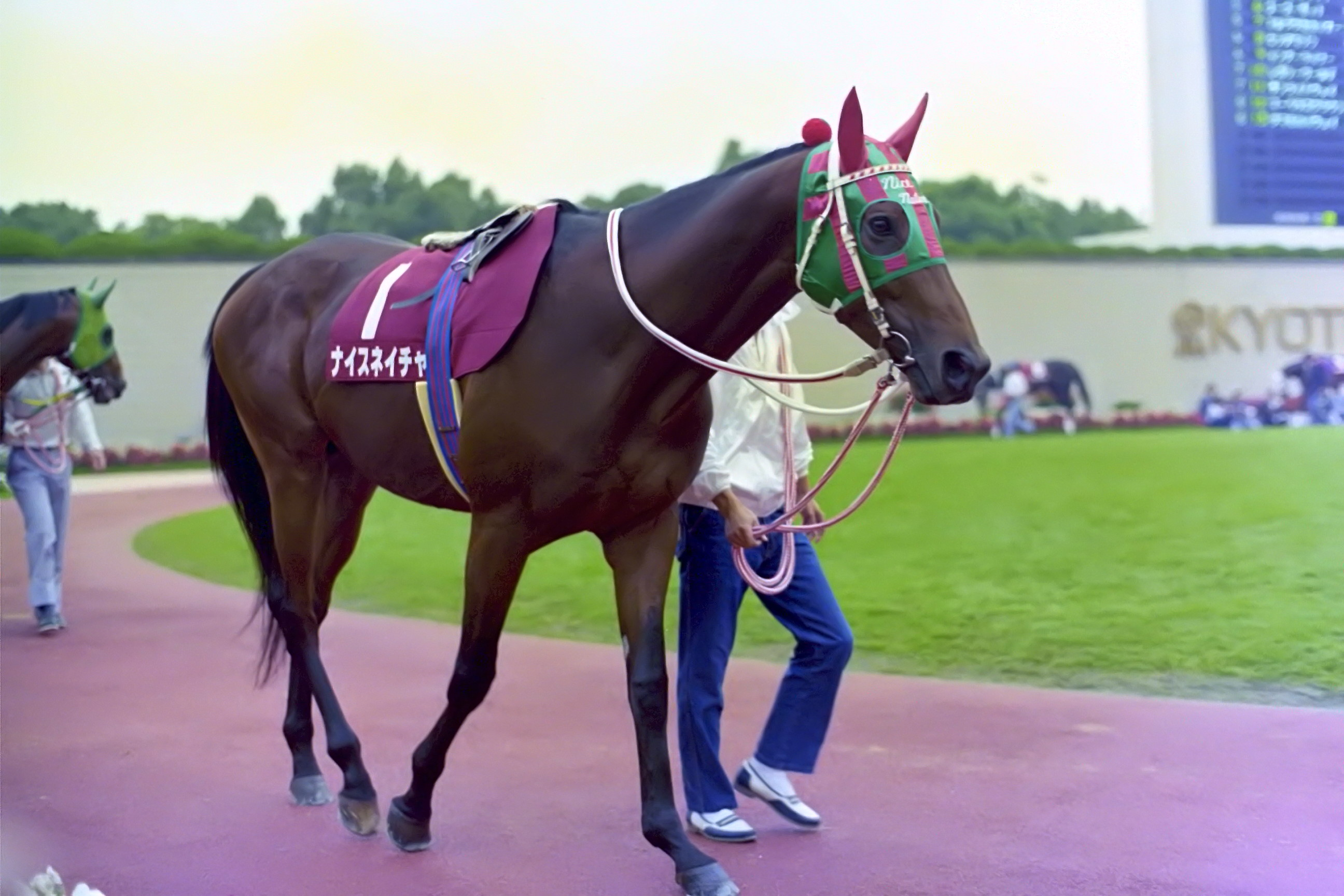 ナイスネイチャ 1995.10.8